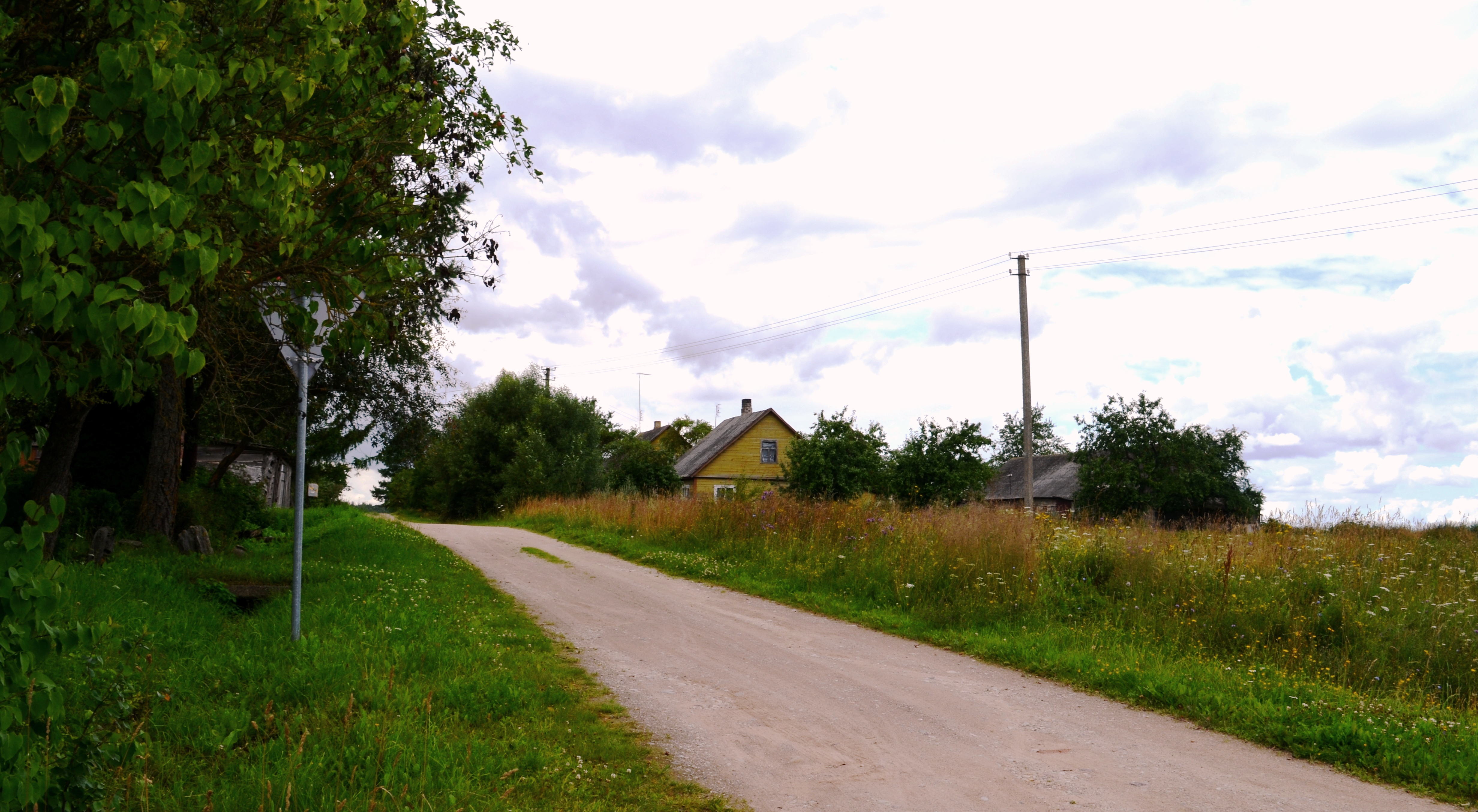 Ąžuolytė, Panevėžio raj.